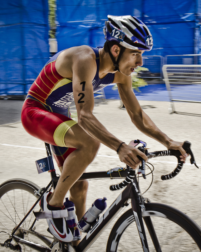 Mario Mola en 2012